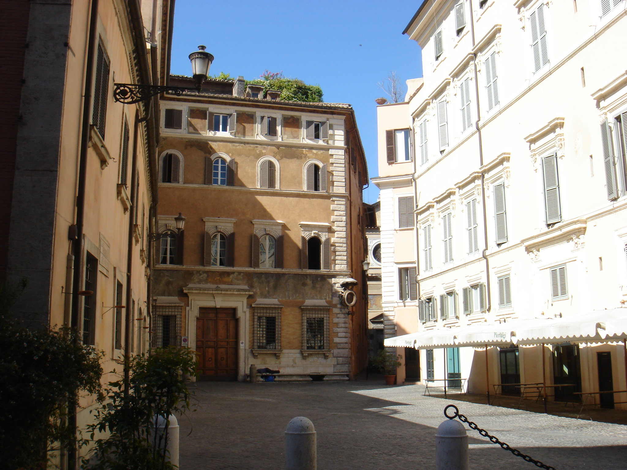 Roma , piazza de' Ricci alla Regola